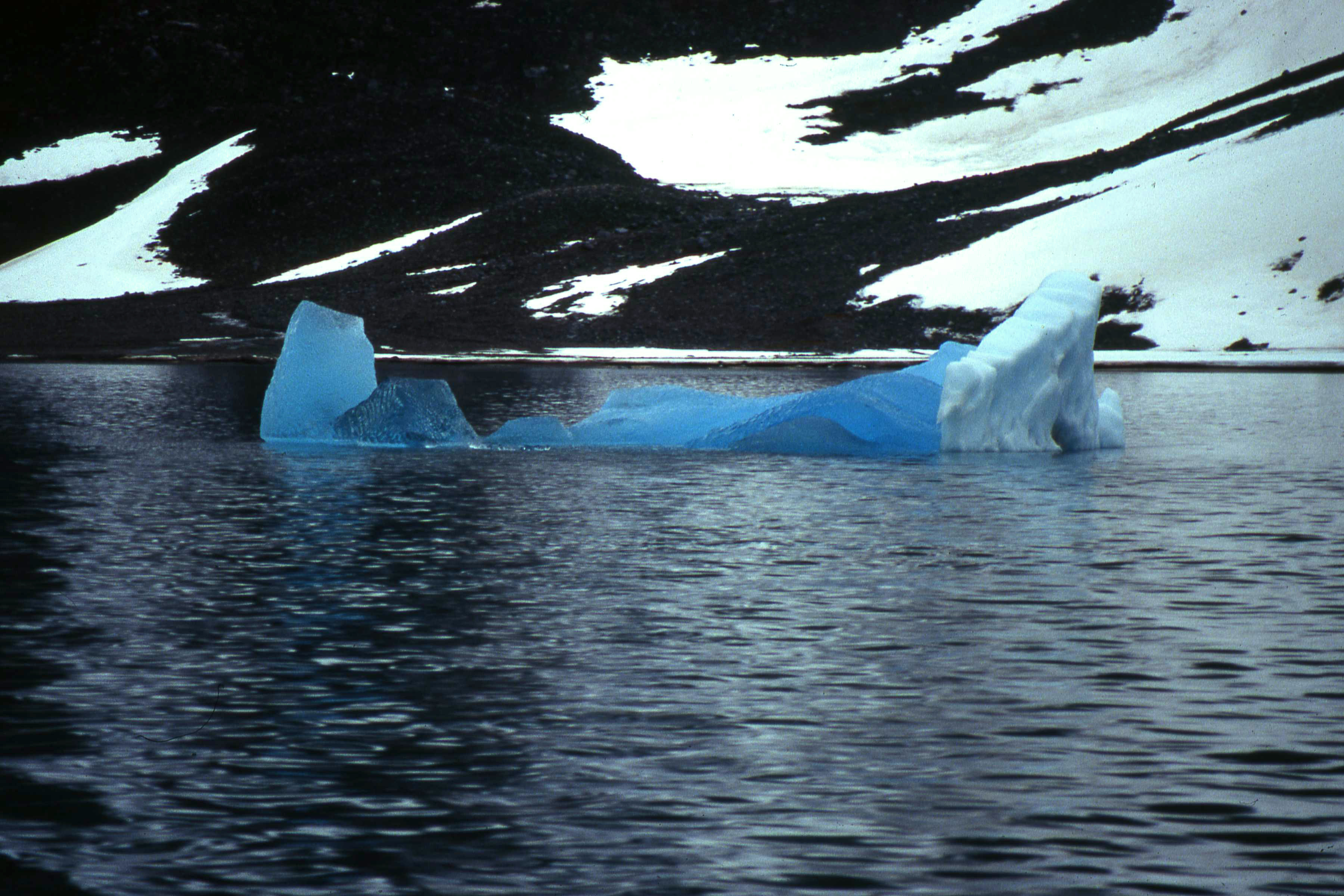 Blauw ijs afkomstig van het diepe deel van een gletser. Ijs onder hoge druk wordt blauw.